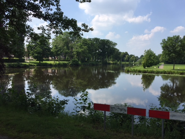 Vanaf de plek waar vroeger obs de Parkschool stond, is een prachtig uitzicht op één van de punten van de buitenste gracht te zien. Aan de overkant het Van Heutsz Park.